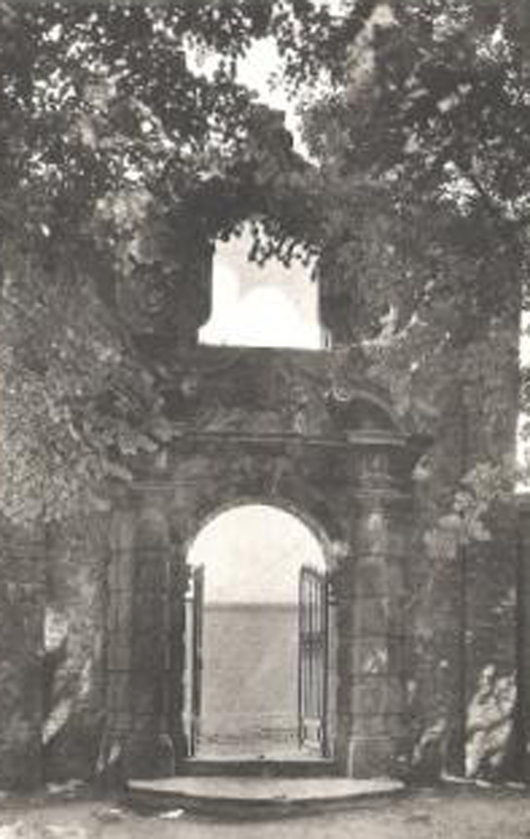 Portail Baroque 1901